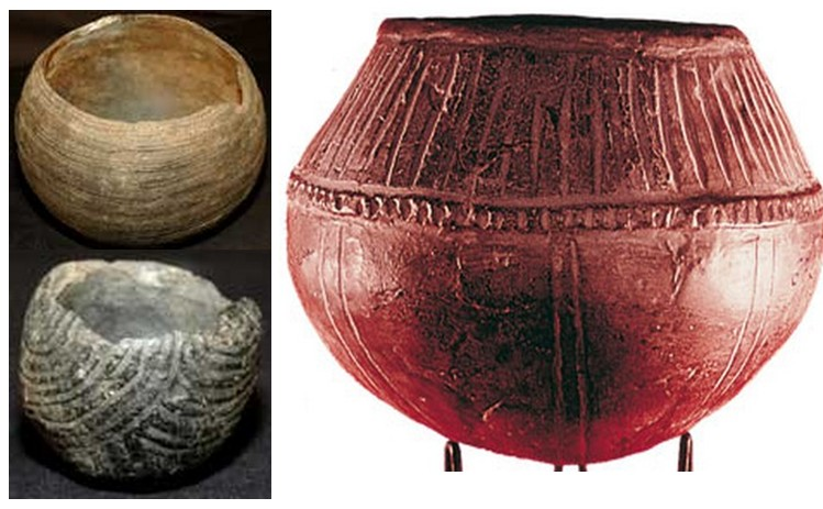 Alfarería precolombina benahoarita o auarita de los aborígenes pobladores de la isla de La Palma, en Canarias.